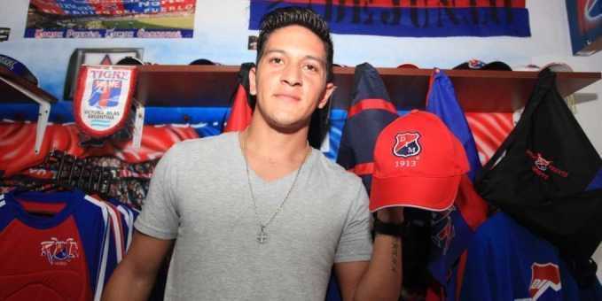 German Cano, en la Tienda del DIM